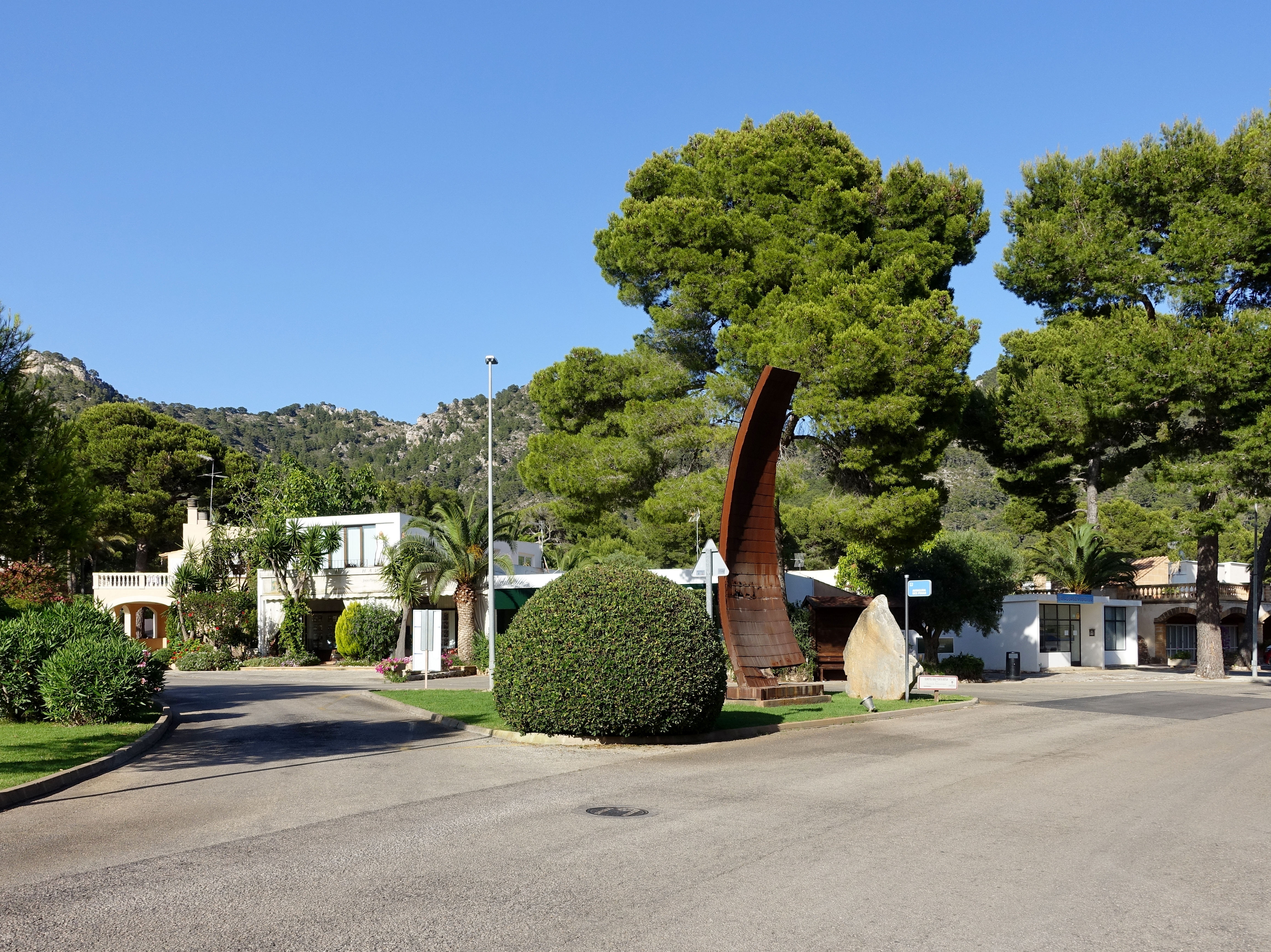 Costa des Pins, Gemeinde Son Servera, Mallorca, Spanien